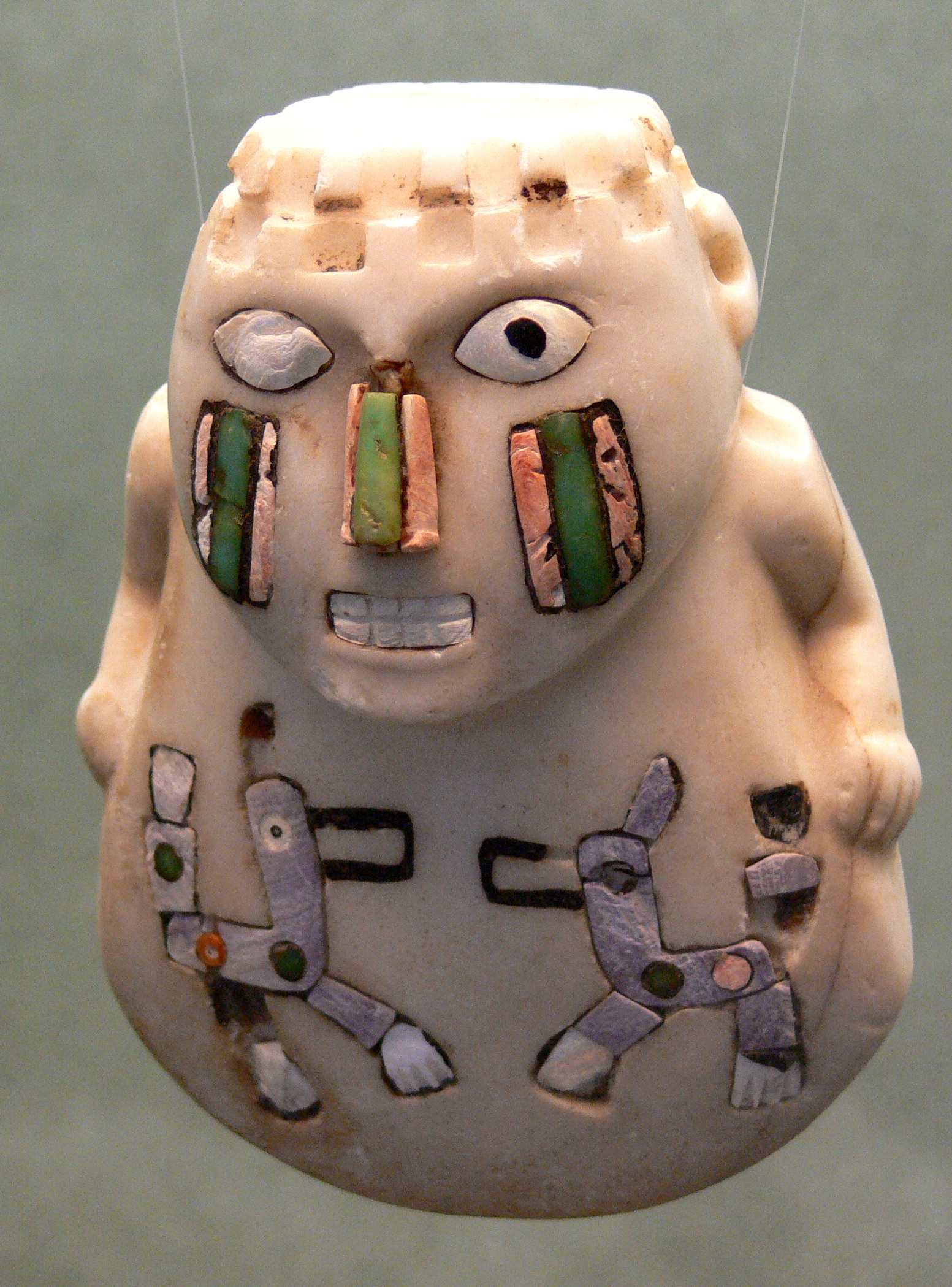 Schaffhausen, Museum zu Allerheiligen, Sammlung Ebnöther, (Abteilung "Idole") Steinfigur mit Inkrustationen; Stein mit Einlagen aus Muscheln und farbigen Steinen; Höhe 9,5 cm; Peru, südliche Küste, Huari, 800–1200 n. Chr. (Katalog 1999, S. 37)